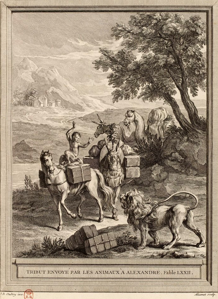 Gravure réalisée par Jacques Aliamet d'après un dessin de Jean-Baptiste Oudry représentant la fable Tribut envoyé par les animaux à Alexandre de Jean de La Fontaine (fable 12 du livre IV). Cette gravure est parue dans l'édition complète des fables de La Fontaine, parue en quatre tomes chez l'éditeur Desaint & Saillant, rue saint Jean de Beauvais à Paris, 1755-1759.